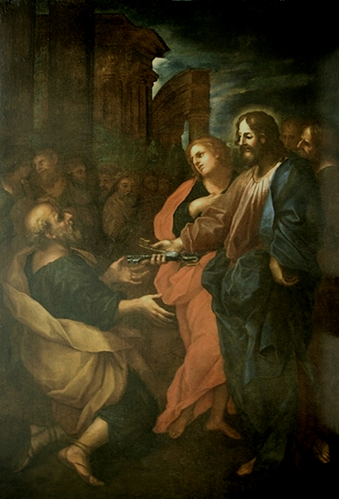 Lazzaro Baldi – La consegna delle chiavi a san Pietro